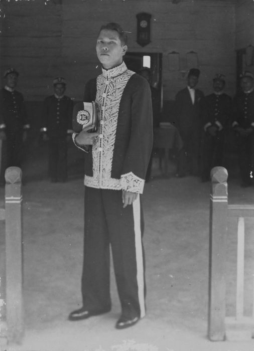 foto. Portret van een jonge Sibayak, Kabandjahe